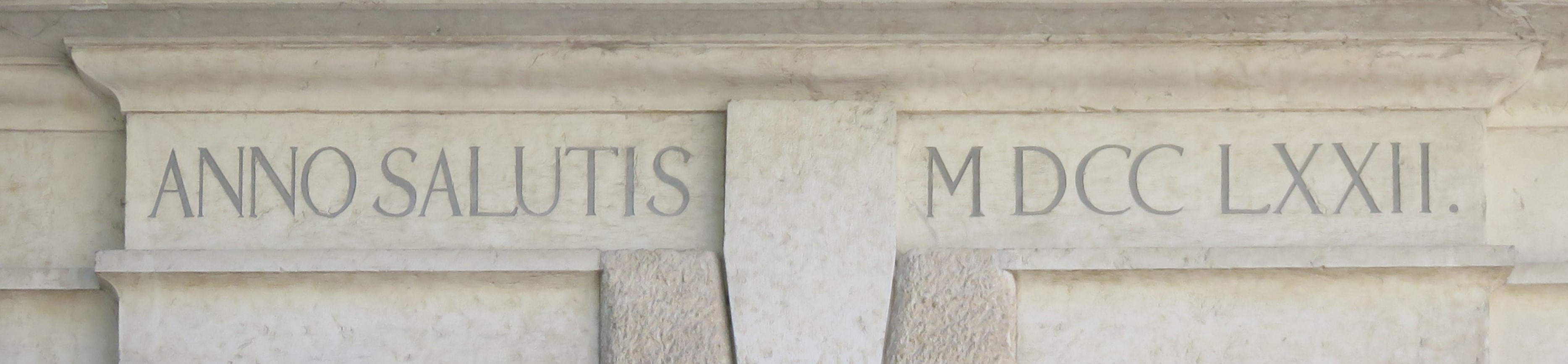 Palazzo Annona - La scritta su una delle porte: ANNO SALUTIS MDCCLXXII.